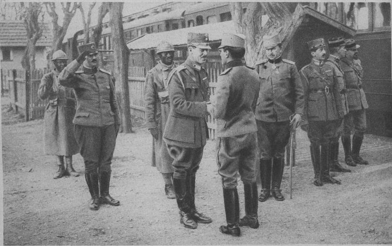 Alexandre de Yougoslavie raccompagne Alexandre I de Grèce à la gare, après la visite du Q.G, en Macédoine.